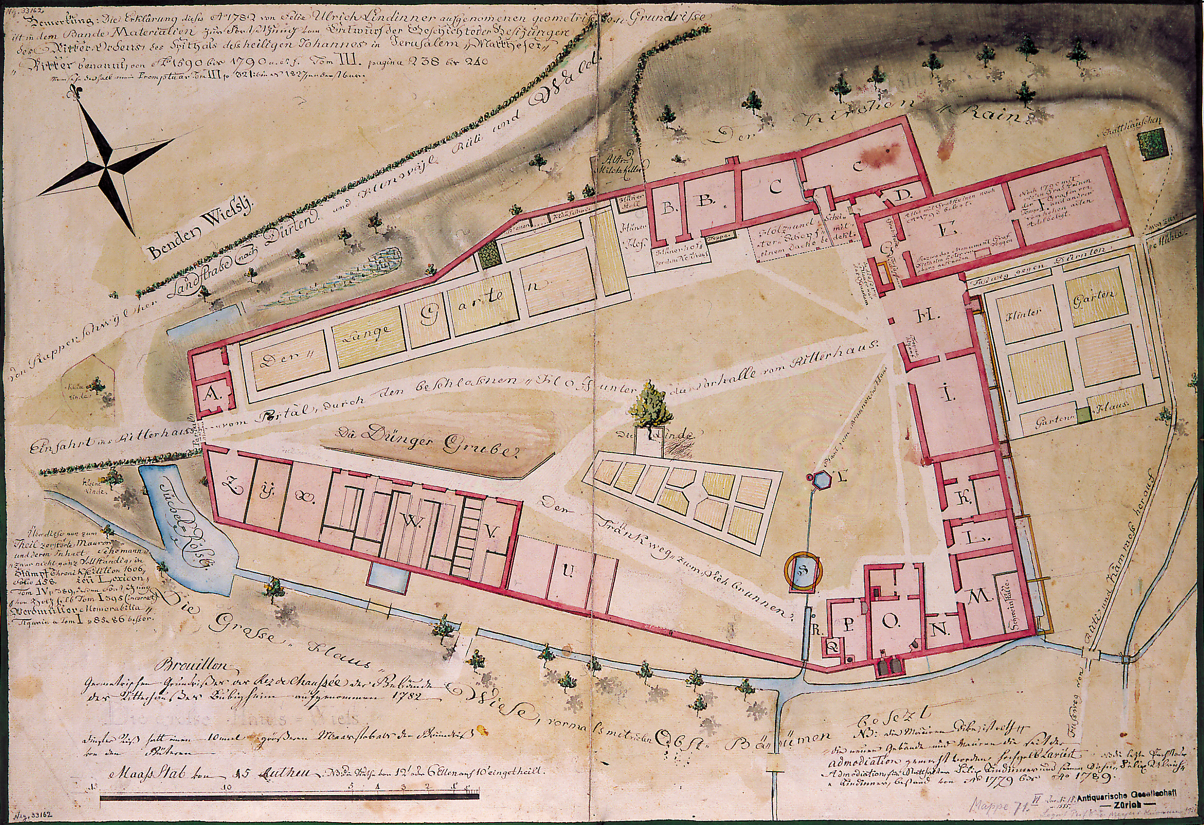 Grundriss der Johanniterkommende Bubikon 1782. Gezeichnet von Felix Lindinner, Sohn des letzten Statthalters der Kommende. Schweizerisches Landesmuseum Zürich.